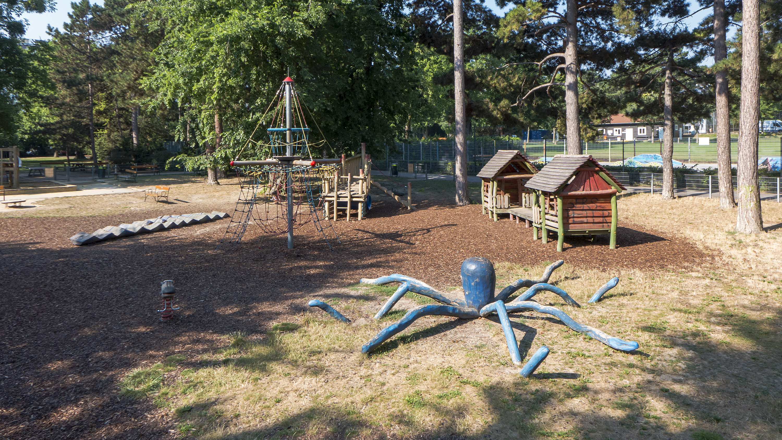 Währinger Park in Wien 18